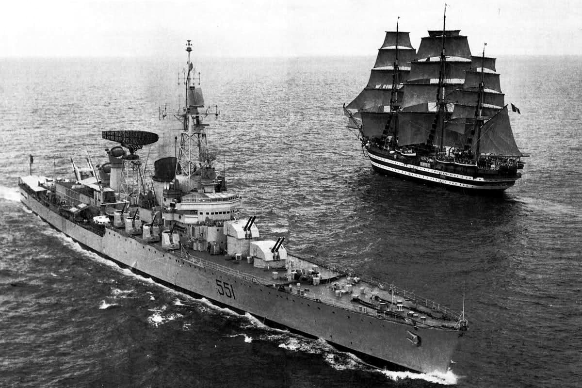 l'incrociatore Garibaldi in controbordo alla Nave scuola Vespucci durante la parata navale di Napoli